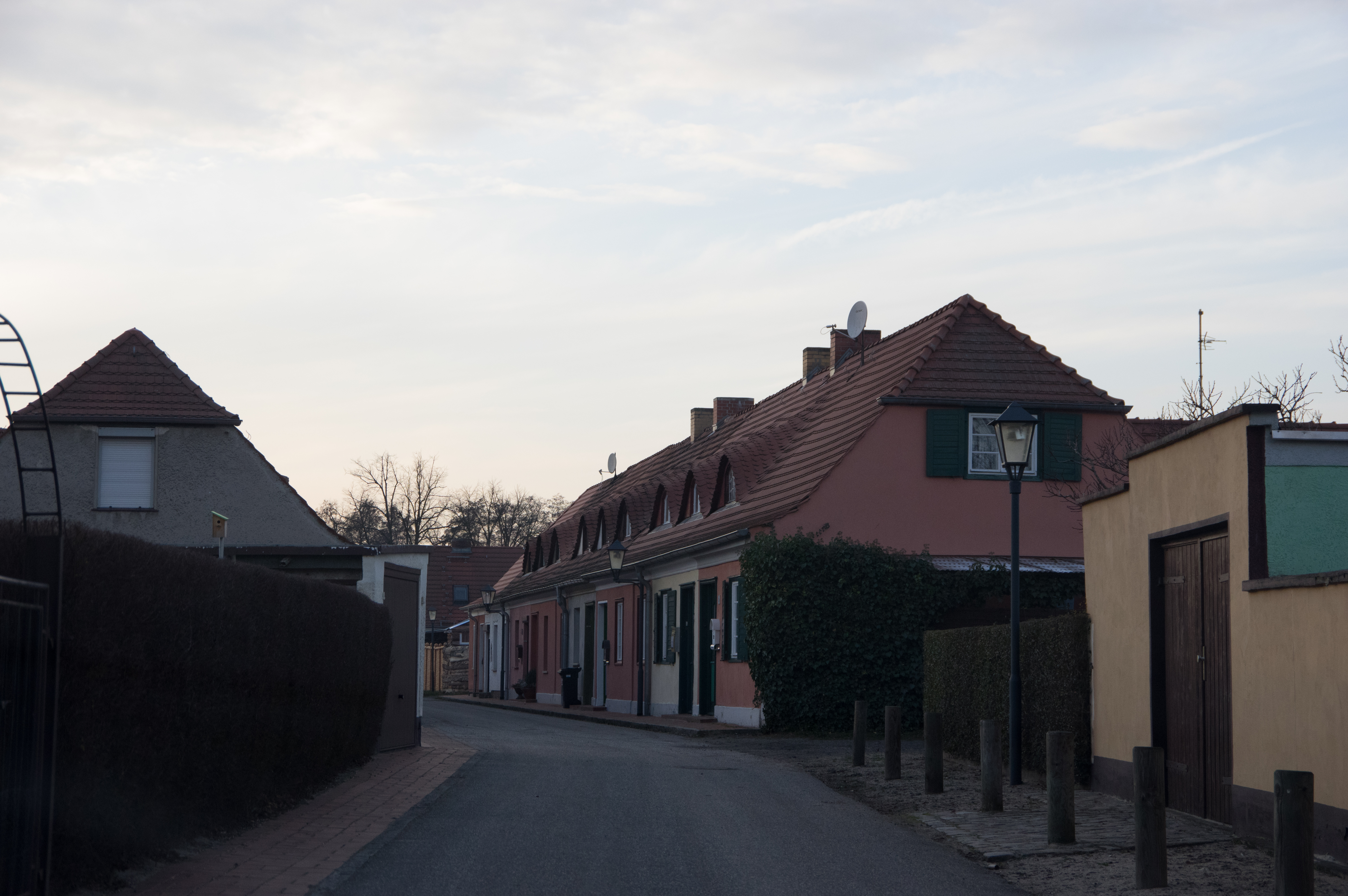 Brandenburg an der Havel, Ortsteil Plaue. Die Gartenstadt steht unter Denkmalschutz.